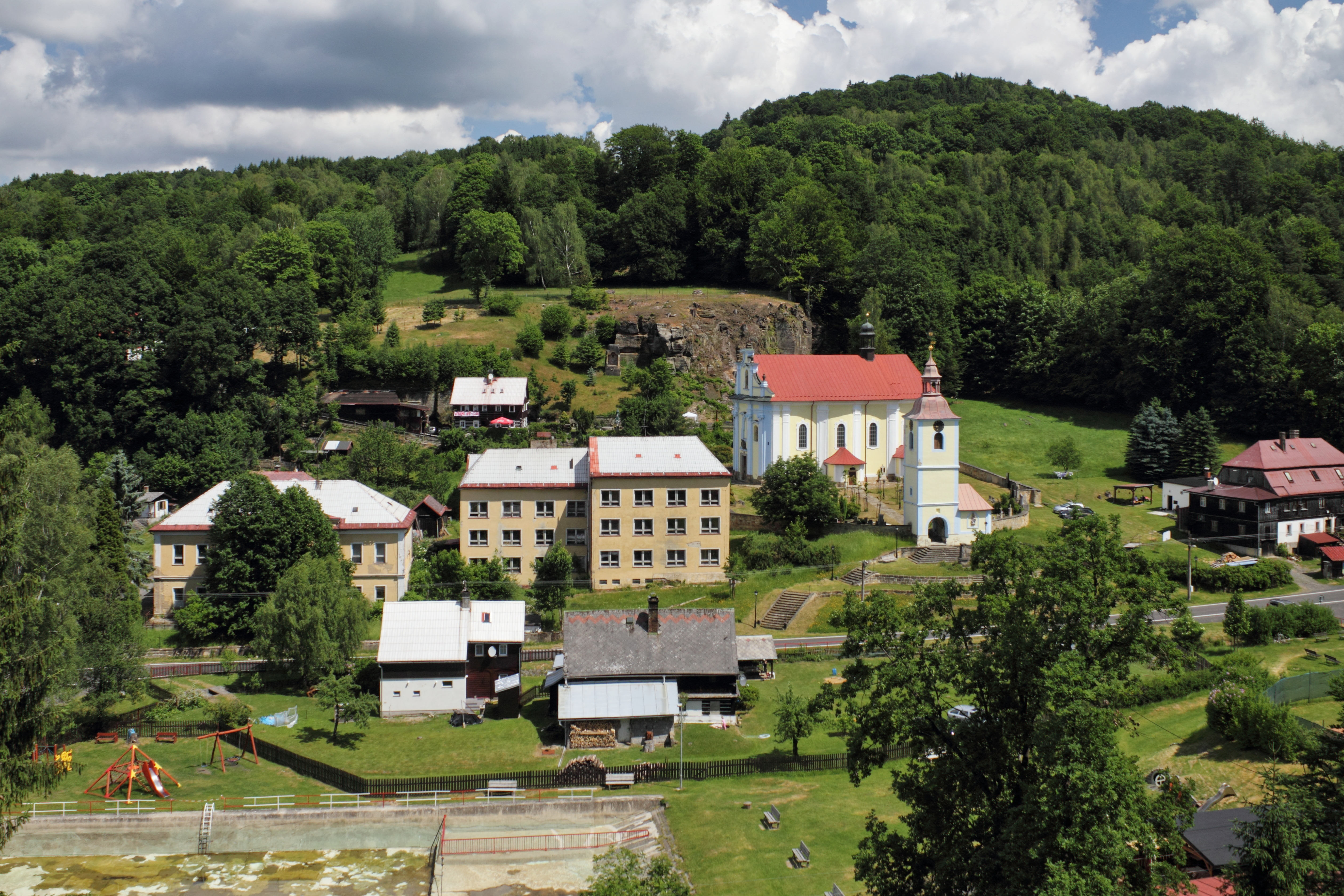 Pohled na Horní Prysk s koupalištěm a kostelem svatého Petra a Pavla v roce 2017